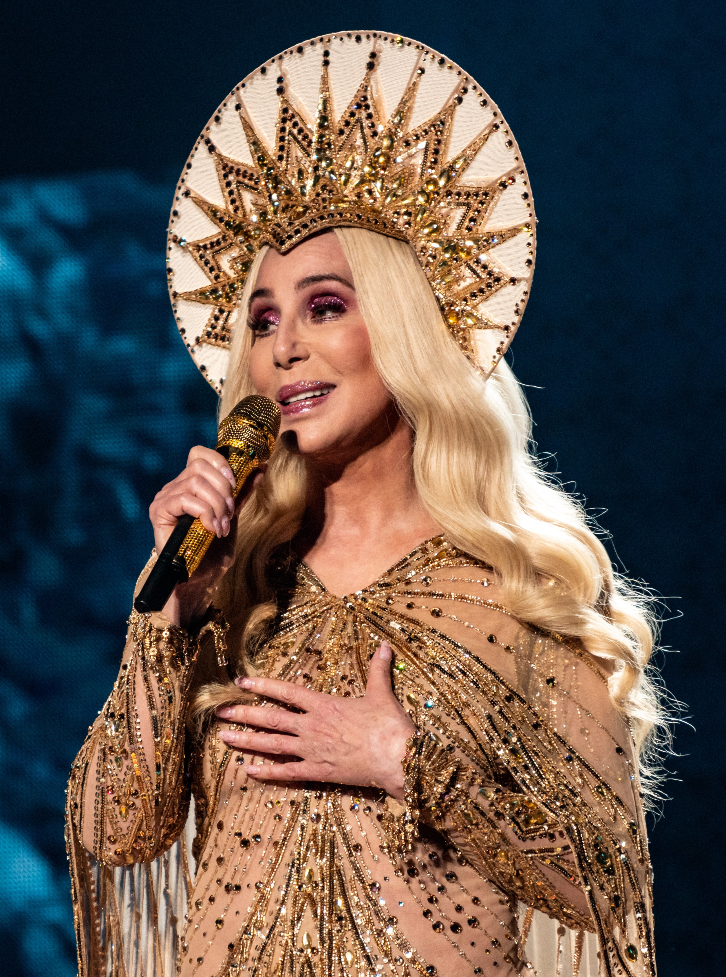 Cantante estadounidense Cher en 2019.